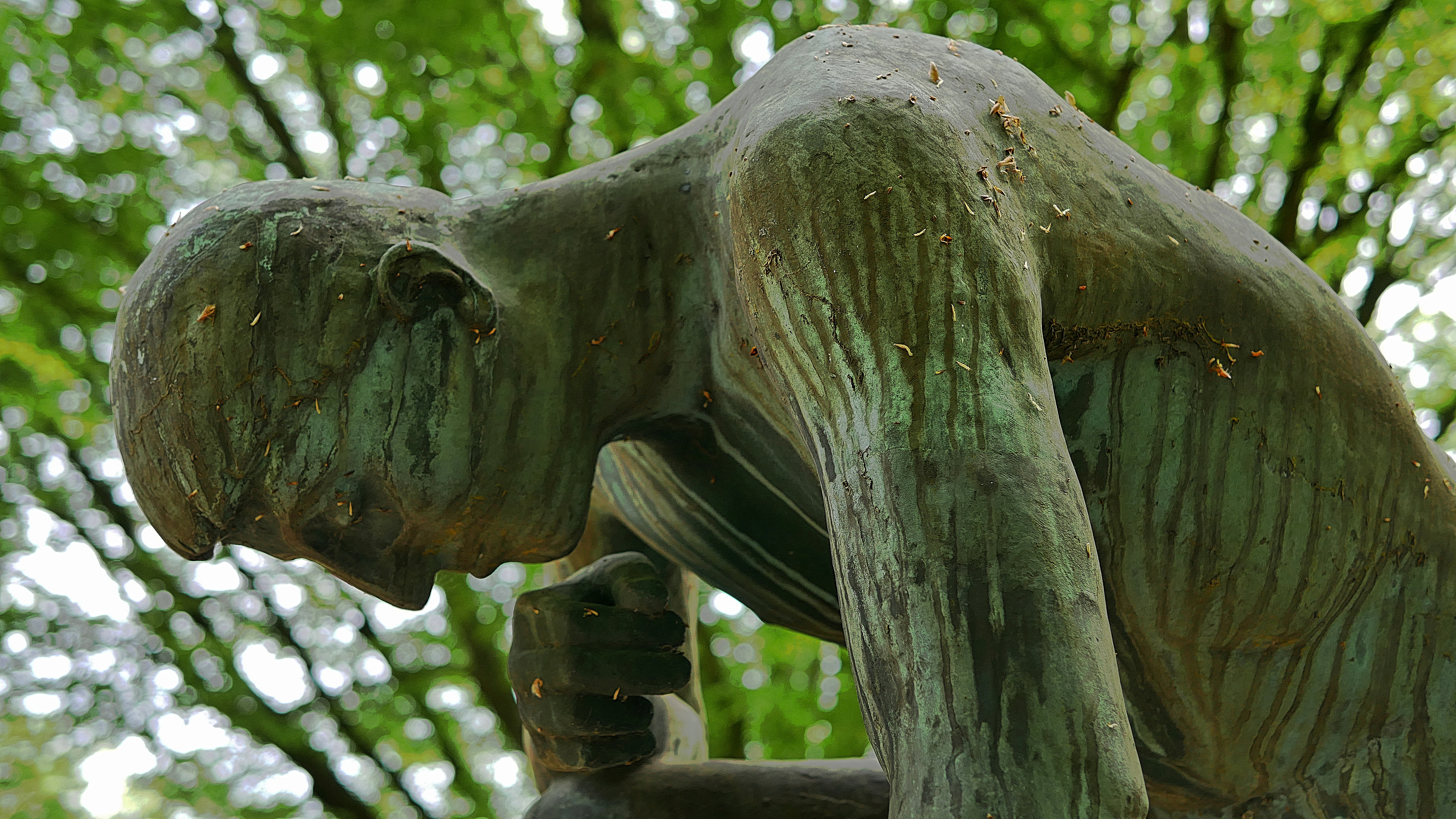 Denkmal für die Opfer der Gewaltherrschaft, 1950 geschaffen vom Trierer Bildhauer Michael Trierweiler. Hauptfriedhof Trier (in der Nähe des jüdischen Friedhofs und der neuen Aussegnungshalle)